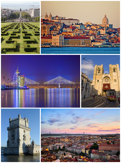 Montagem de fotos de Lisboa, Portugal. Do topo, em sentido horário: o Parque Eduardo VII, a Praça do Comércio com Centro Histórico ao fundo, a Sé de Lisboa, um panorama da cidade com a Ponte 25 de Abril ao fundo, a Torre de Belém e o Parque das Nações com a Ponte Vasco da Gama ao fundo.